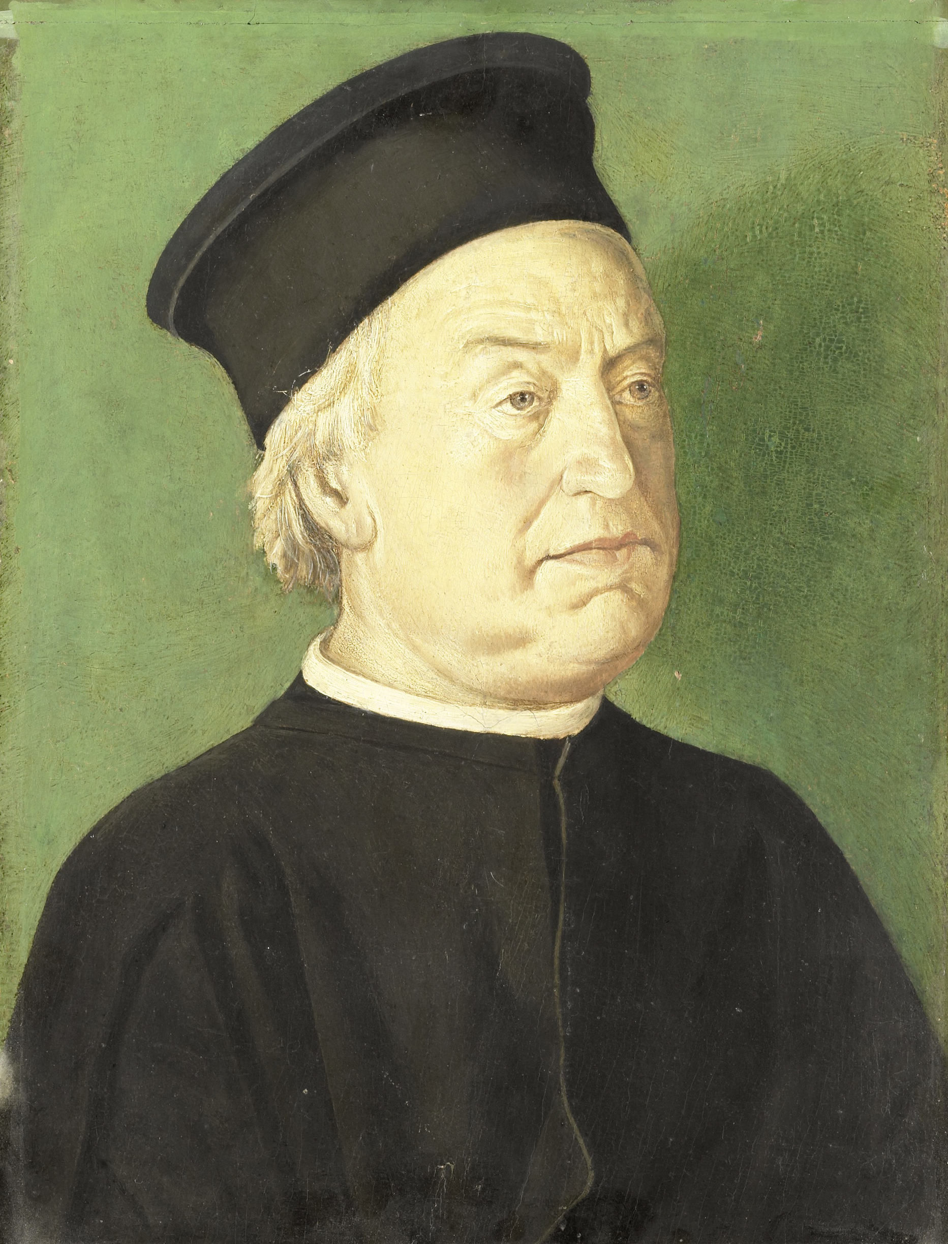 Portret van een man. oil on panelmedium QS:P186,Q296955;P186,Q1348059,P518,Q861259. Height: 42.5 cm (16.7 ″); Width: 32 cm (12.5 ″) dimensions QS:P2048,42.5U174728;P2049,32U174728. Amsterdam, Rijksmuseum Amsterdam.